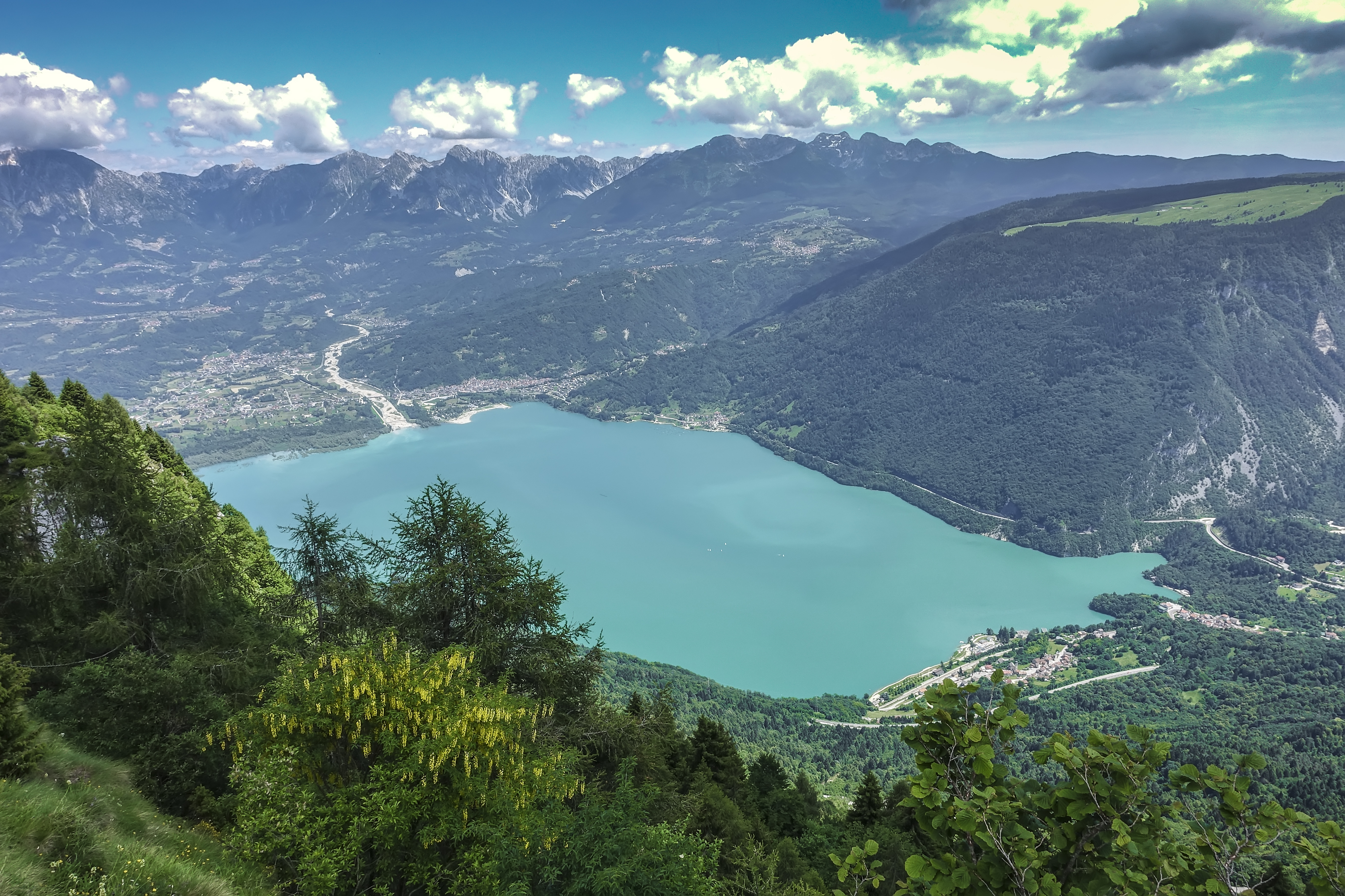 Vista sul Lago di Santa Croce e Alpago(Q49963632)